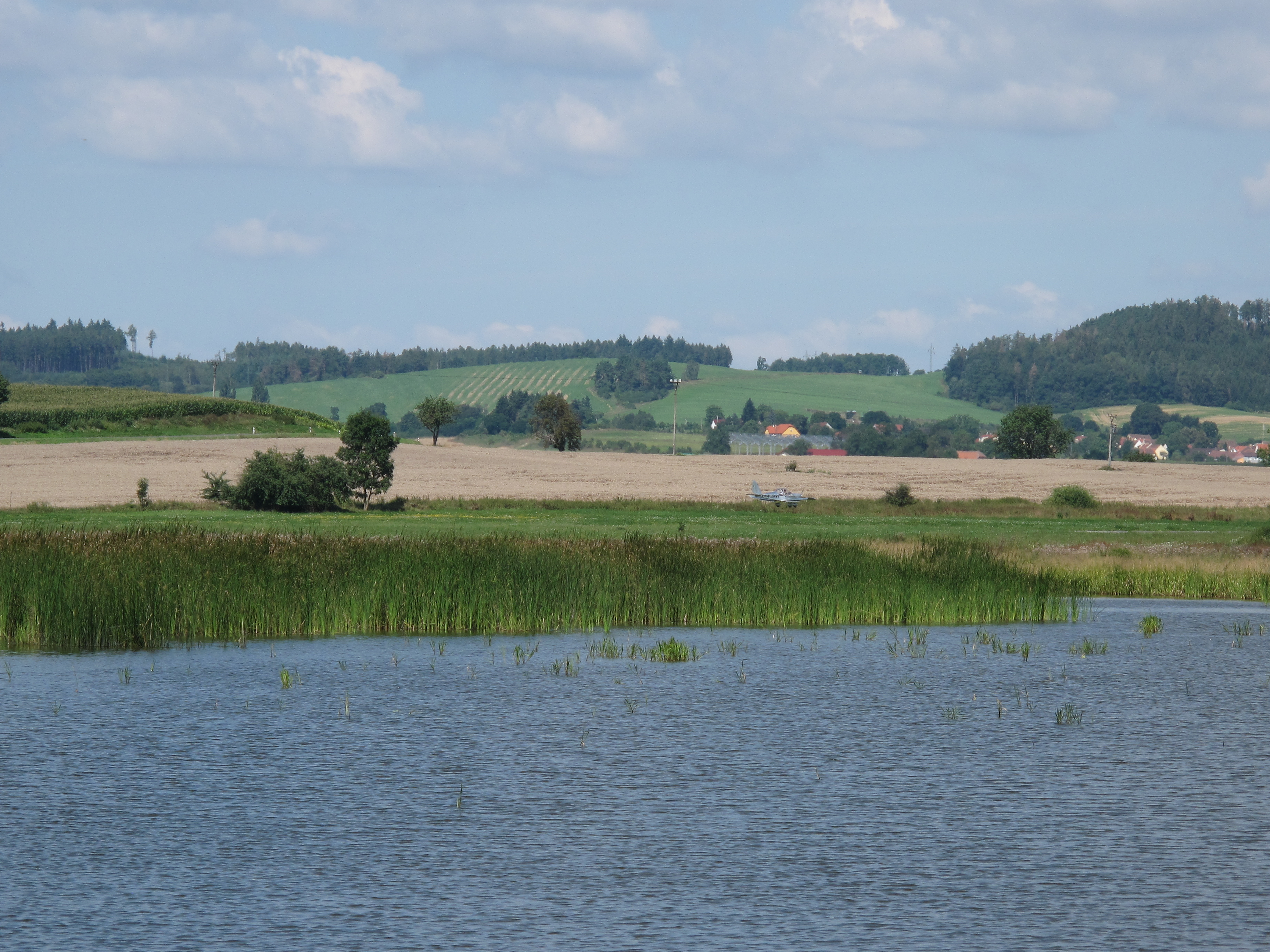 Krašovický rybník (Čížová). Písek, Česká republika.